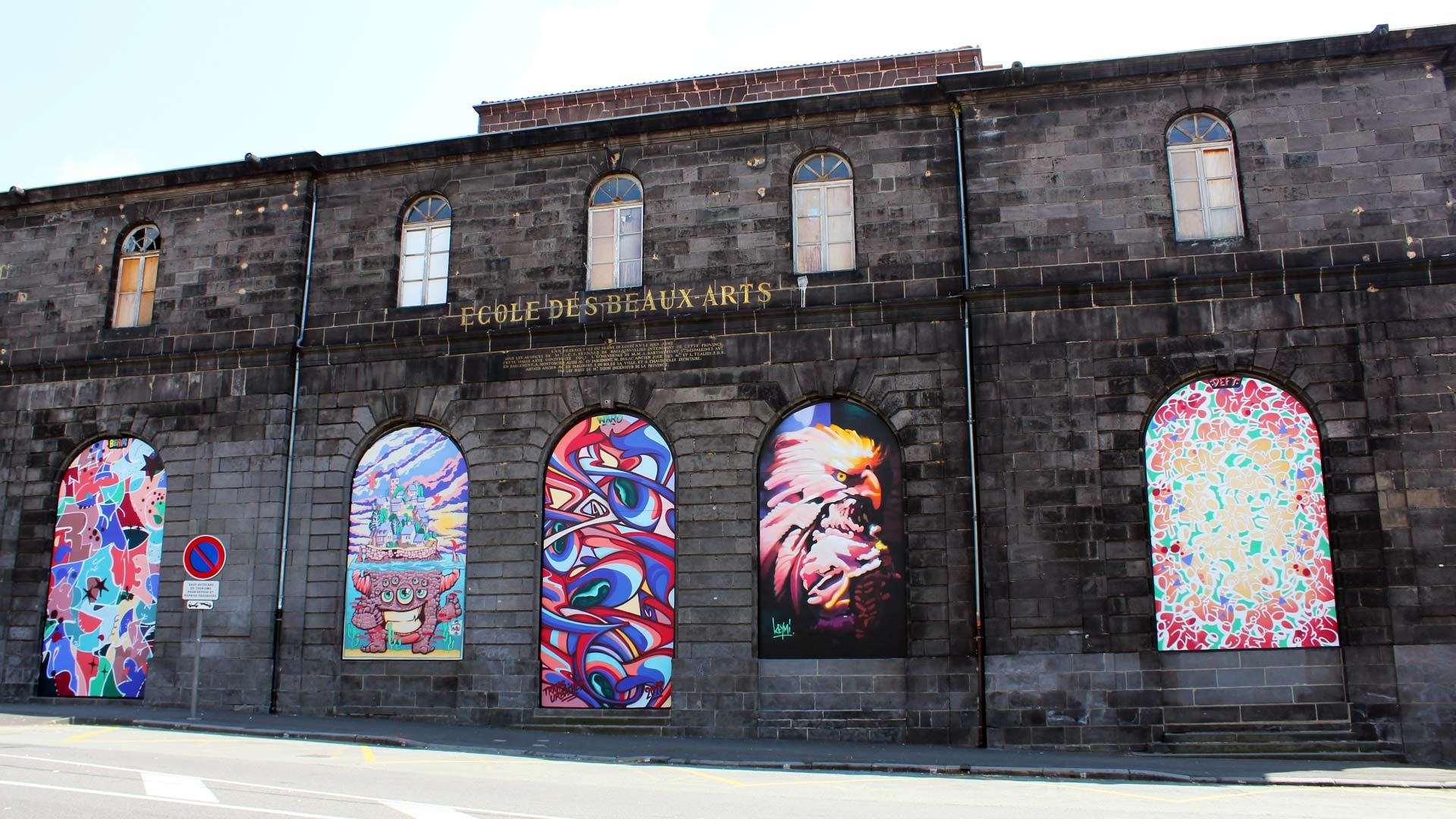 Fresques réalisées dans les ouvertures de la halle aux blés de Clermont-Ferrand en 2018 par les artistes : Beame, Motte, Waro, Keymi et Deft